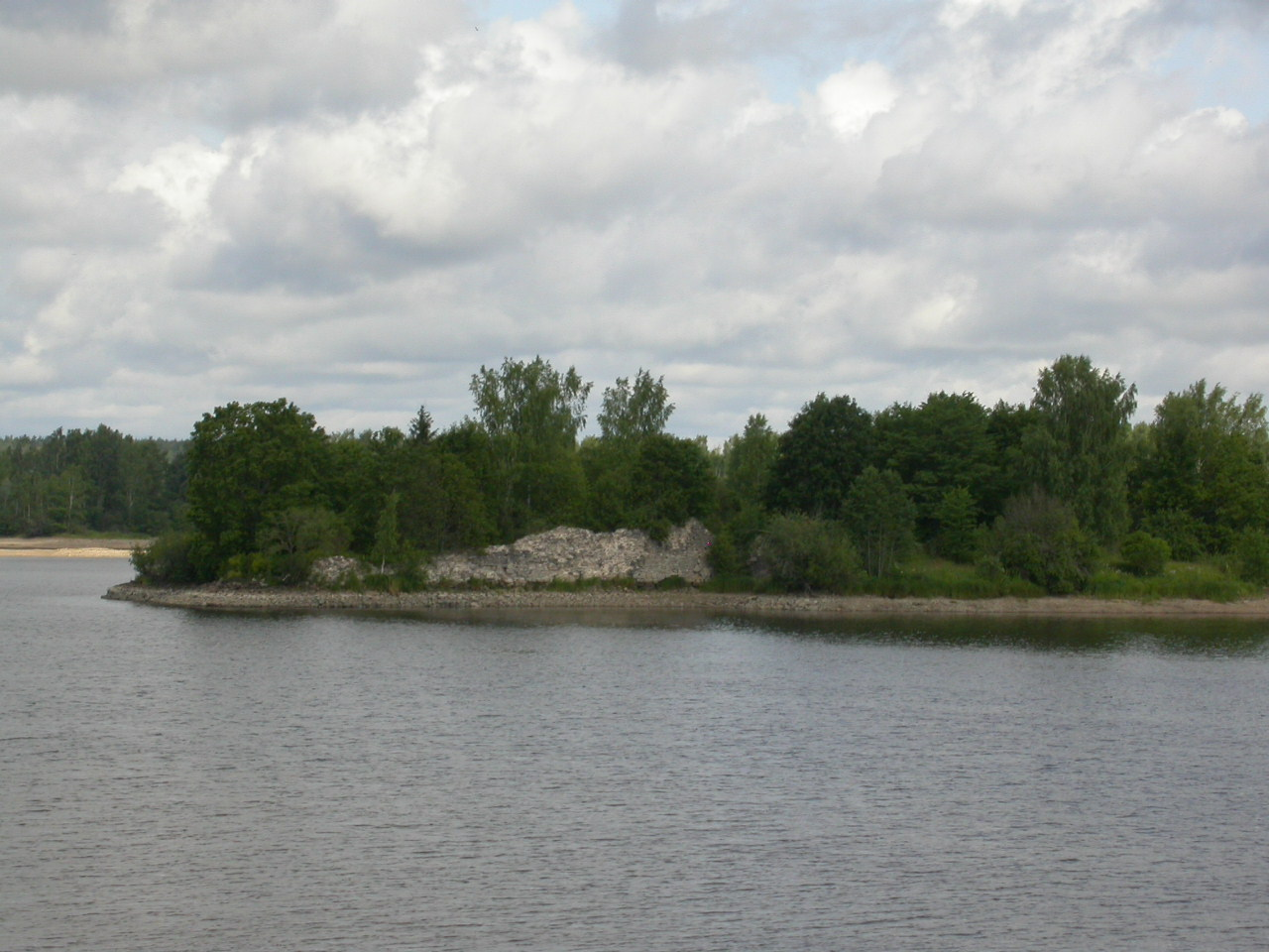 Selpilsi linnus jõe vasakult kaldalt vaadatuna.